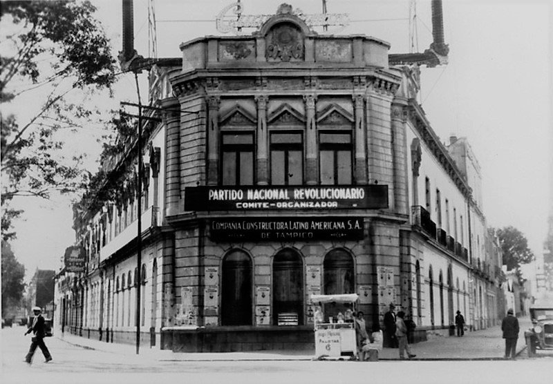 Oficinas del Comité Organizador del Partido Nacional Revolcionario en la esquina del Paseo de la Reforma y Avenida del Palacio Legislativo núm. 2.